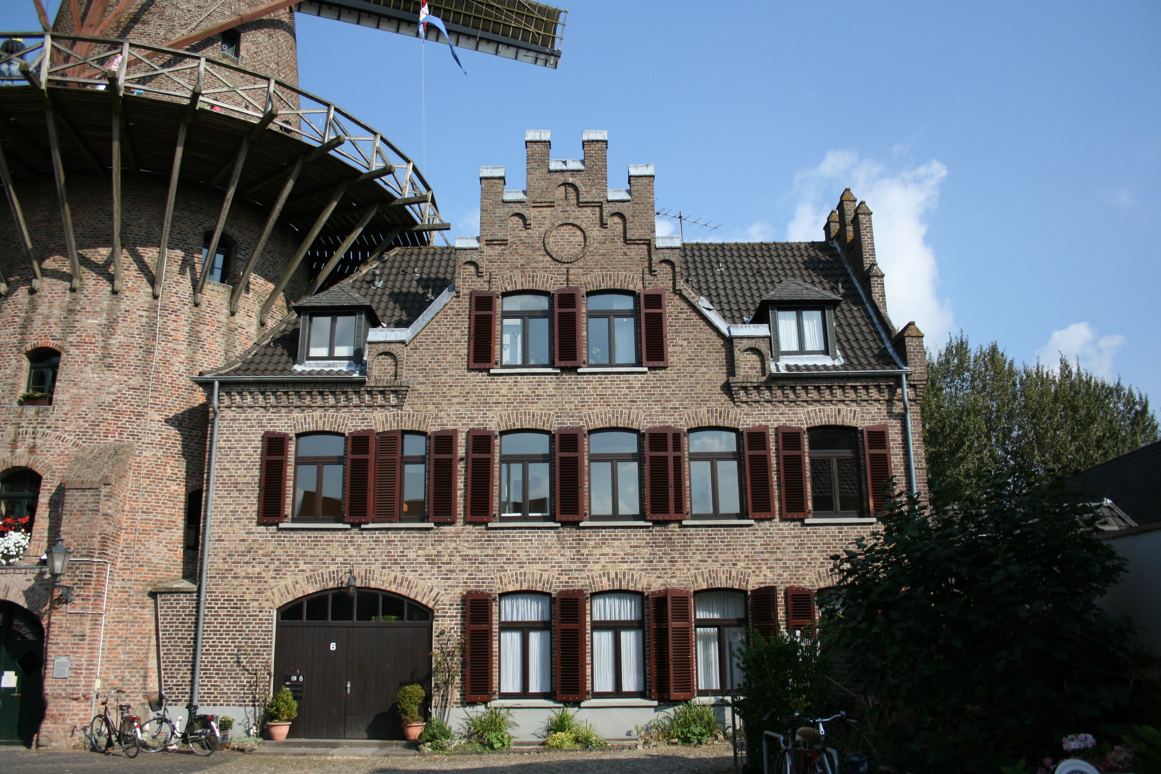 Kalkarer Mühle in Kalkar, Gebäude Mühlenstege 6 This is a photograph of an architectural monument.